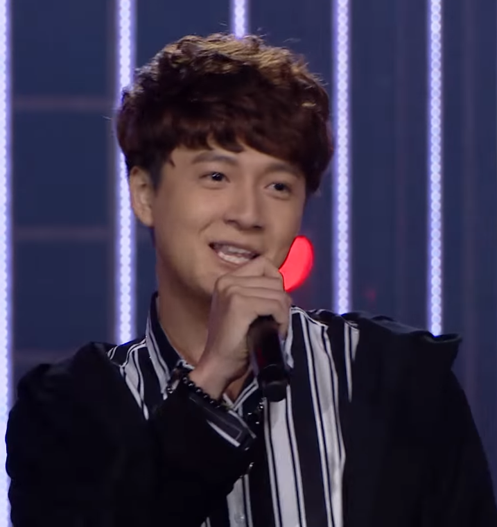 Ngô Kiến Huy, ảnh chụp màn hình từ video của Gương Mặt Thân Quen Official (screen capture from video of Gương Mặt Thân Quen Official).